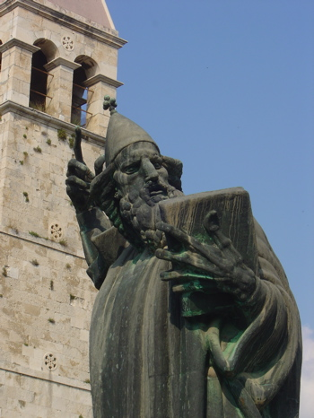 Grgur Ninski, Split